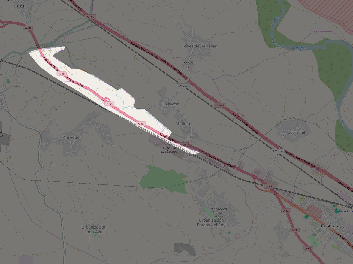 Mapa del distrito de Villarrapa en Zaragoza.